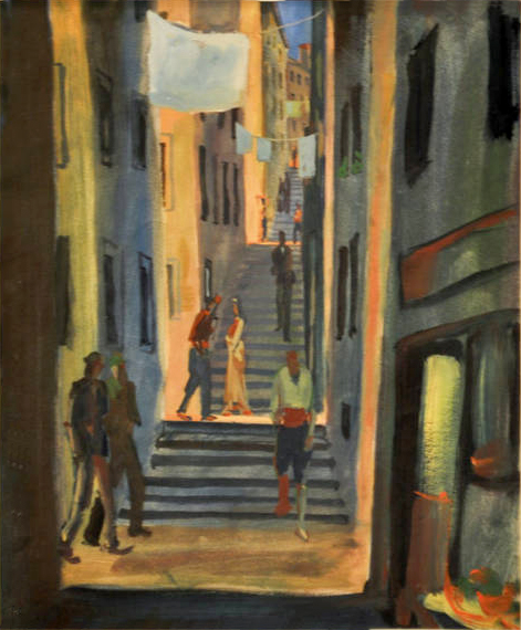 Ragusa (Dubrovnik)